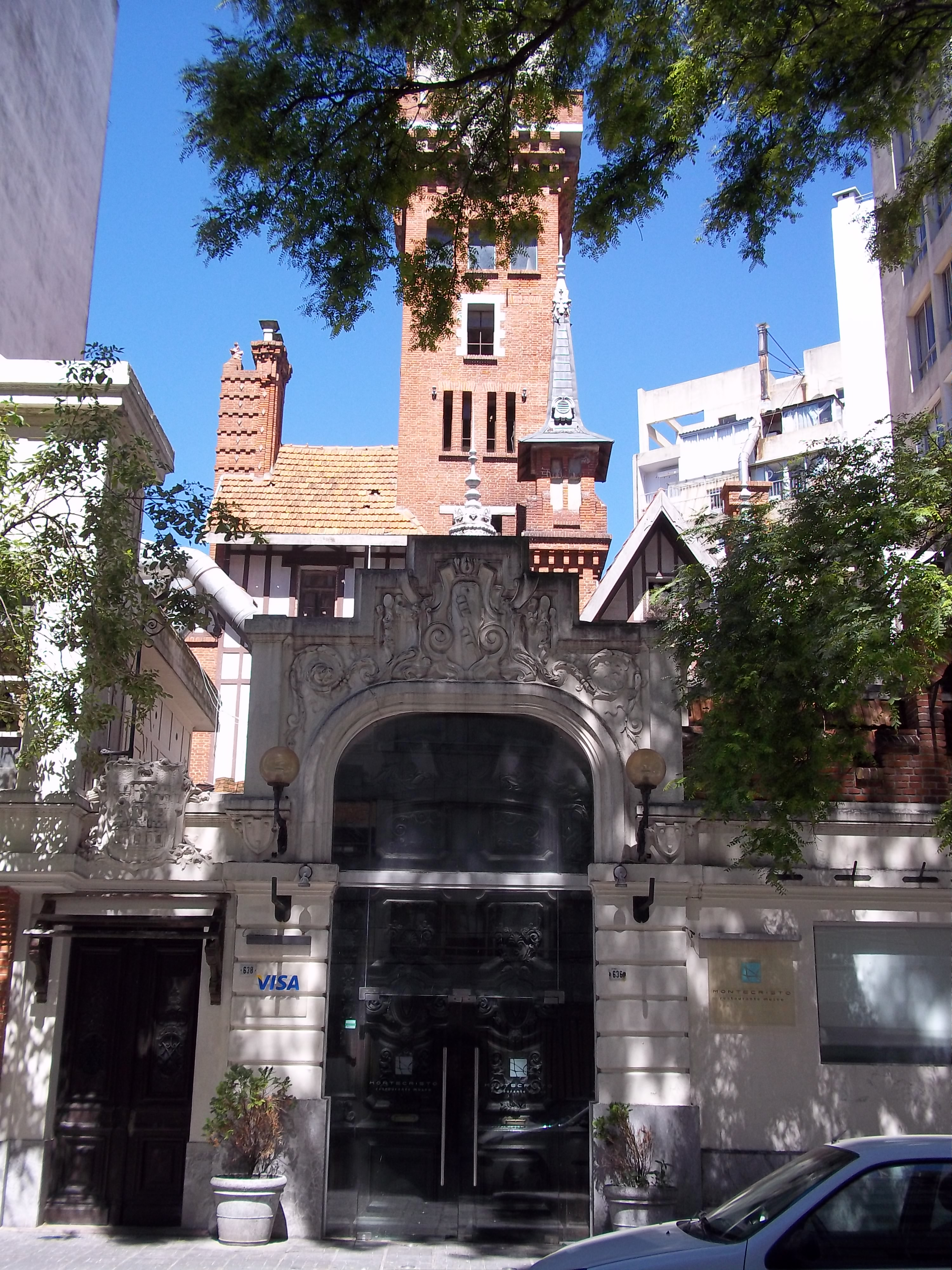 Vista completa de la puerta del Castillo Pittamiglio. Actualmente es el ingreso al Restaurant-Museo que funciona en el interior del castillo. Las puertas originales de madera están detrás de dos puertas de vidrio. Por detrás se asoman algunas torrecillas del edificio. Lamentablemente el muro que rodeaba la edificación y contorneaba la cuadra ha desaparecido.